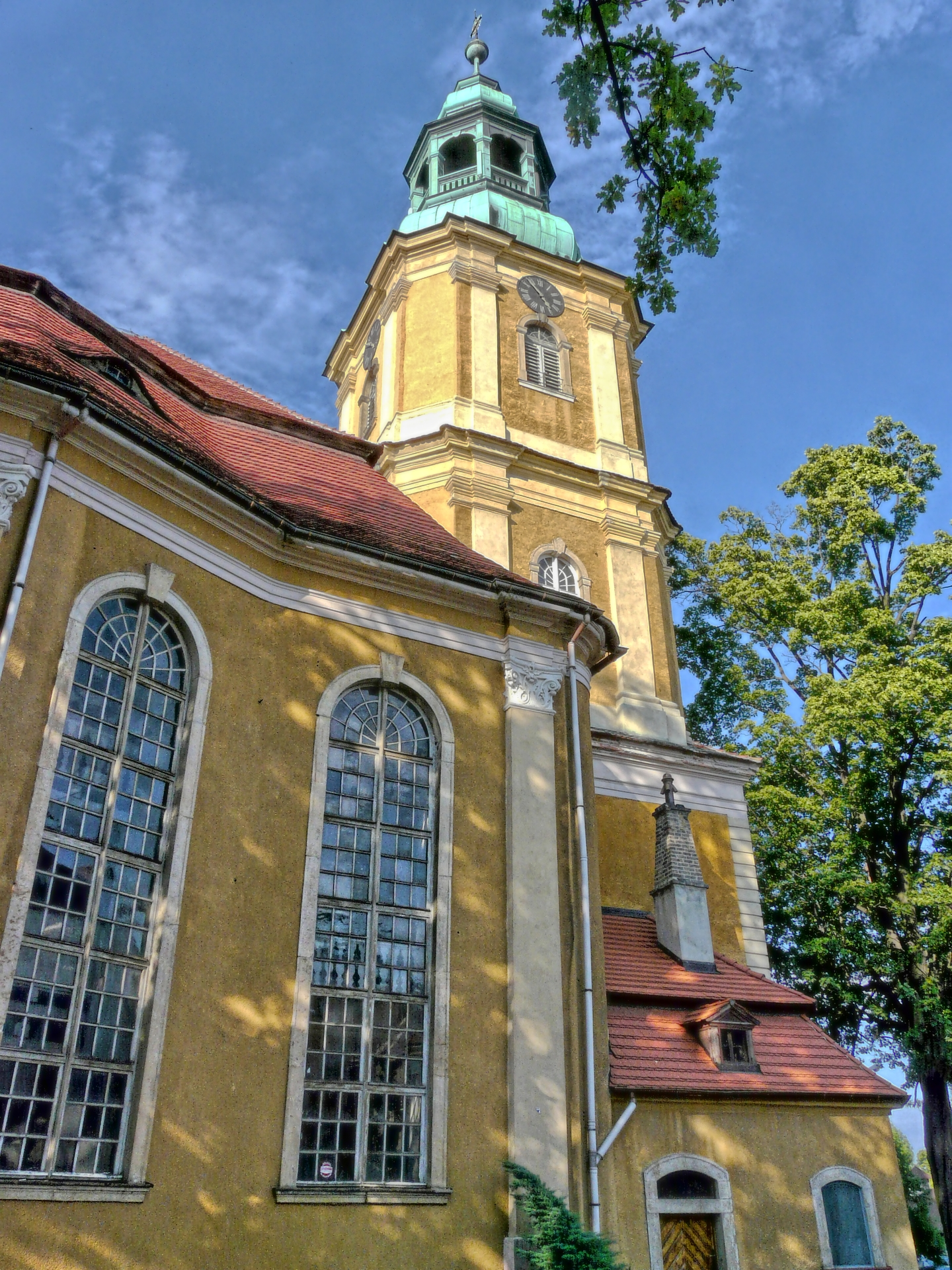 Jelenia Góra Cieplice Śląskie-Zdrój - ewangelicko-augsburski Kościół Zbawiciela